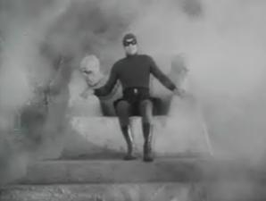 Screenshot da me realizzato dal trailer ufficiale del film The Phantom (1943), disponibile sul sito [1]